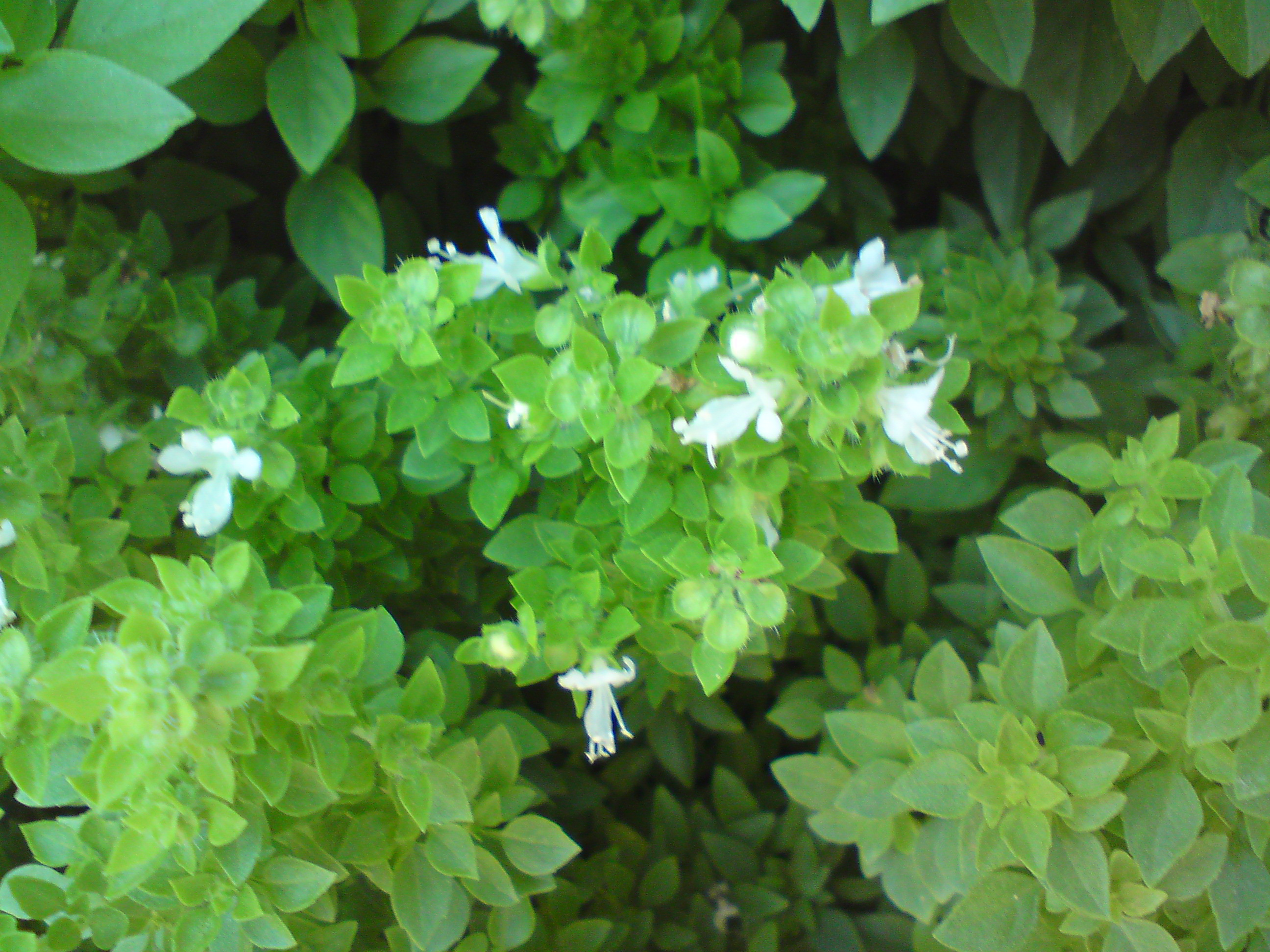 Ocimum basilicum